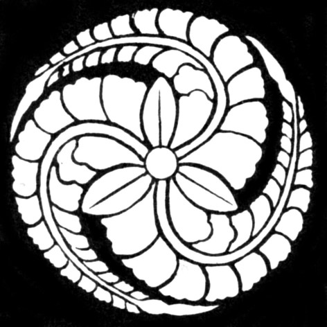 藤巴紋